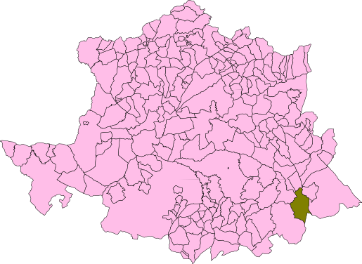 Situación del término municipal de Cañamero respecto a la provincia de Cáceres, en España.